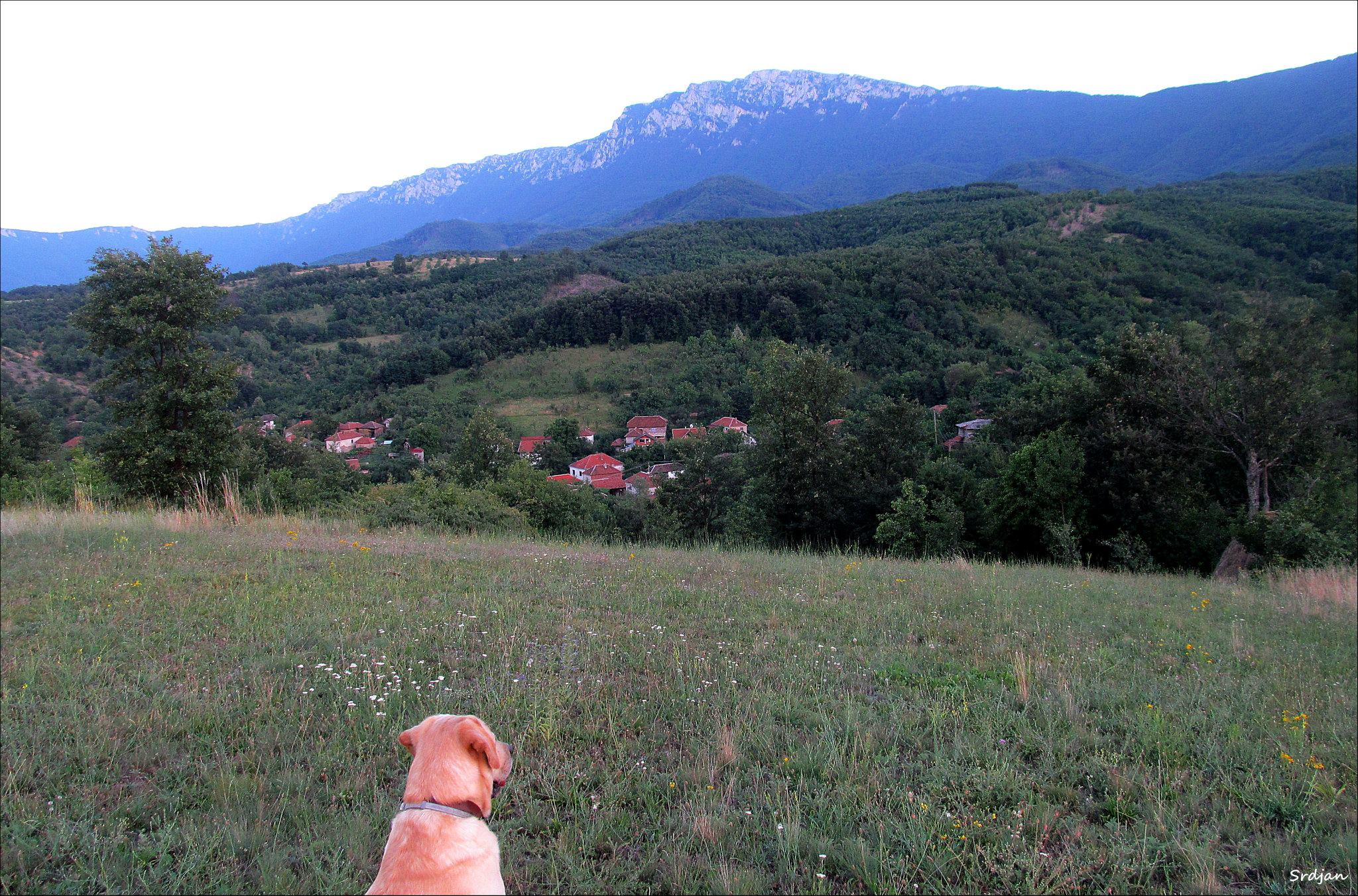 Srpski (latinica): Selo Veta, Srbija